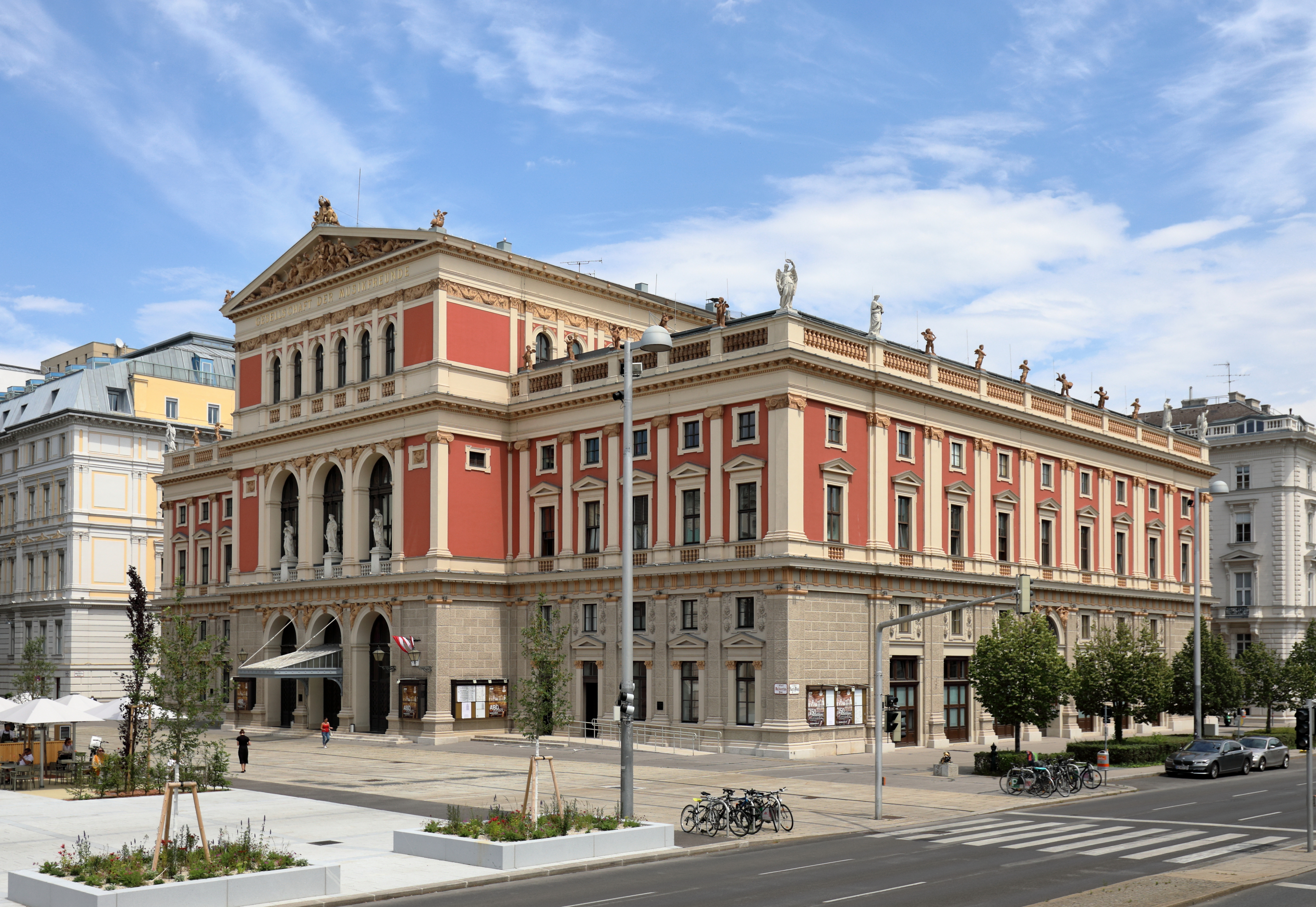 Südwestansicht des Wiener Musikvereinsgebäude an der Adresse Karlsplatz Nr. 6 / Wiener Musikvereinsplatz Nr. 1 im 1. Wiener Gemeindebezirk Innere Stadt.Das Gebäude mit zwei großen Konzertsälen und im Stil der „hellenistischen Renaissance" wurde nach Plänen des Architekten Theophil Hansen ab 1867 errichtet und am 6. Jänner 1870 mit einem feierlichen Konzert eröffnet. Anfang der 2000er-Jahre wurde das Gebäude unterirdisch in Richtung Künstlerhaus nach Plänen von Wilhelm Holzbauer um rund 30 Millionen Euro erweitert. Am 20. März 2004 wurden die dabei vier errichtete Veranstaltungssäle für das Publikum geöffnet.